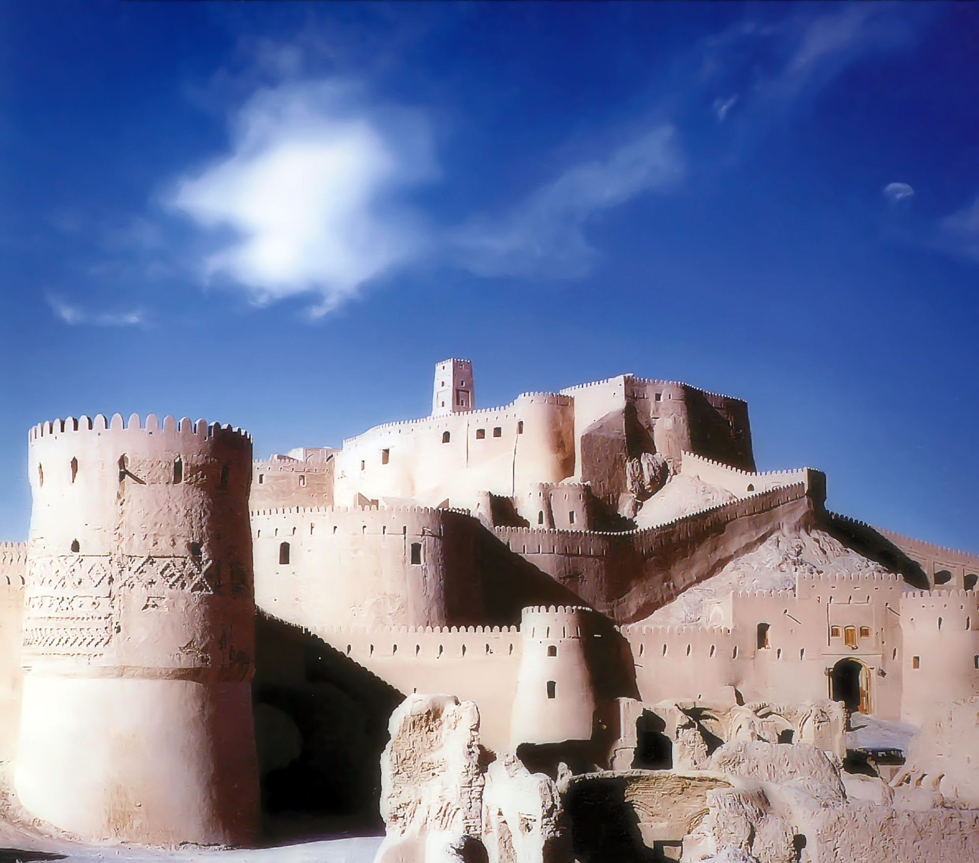 Arge Bam, Bam, Iran